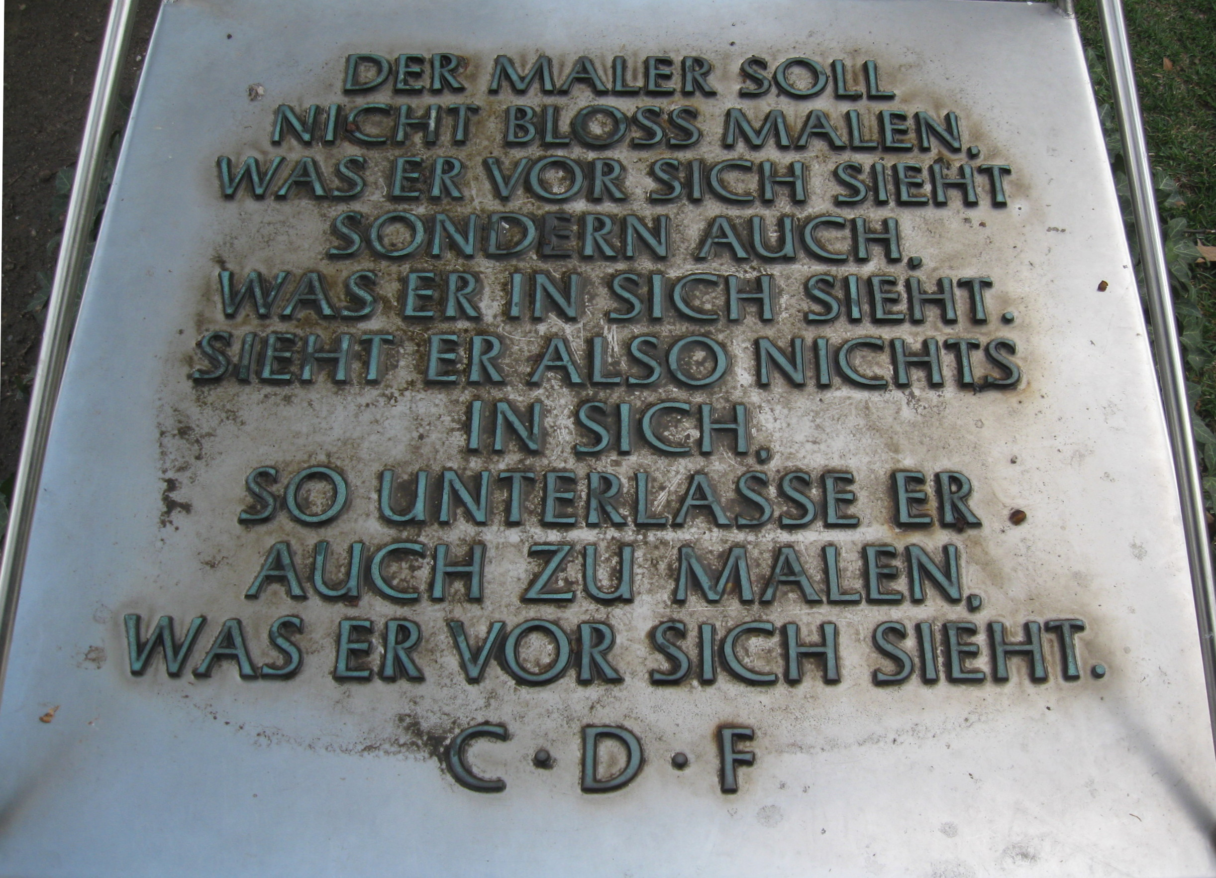 Dresden, Brühlsche Terrasse, Caspar-David-Friedrich-Denkmal, Inschrift